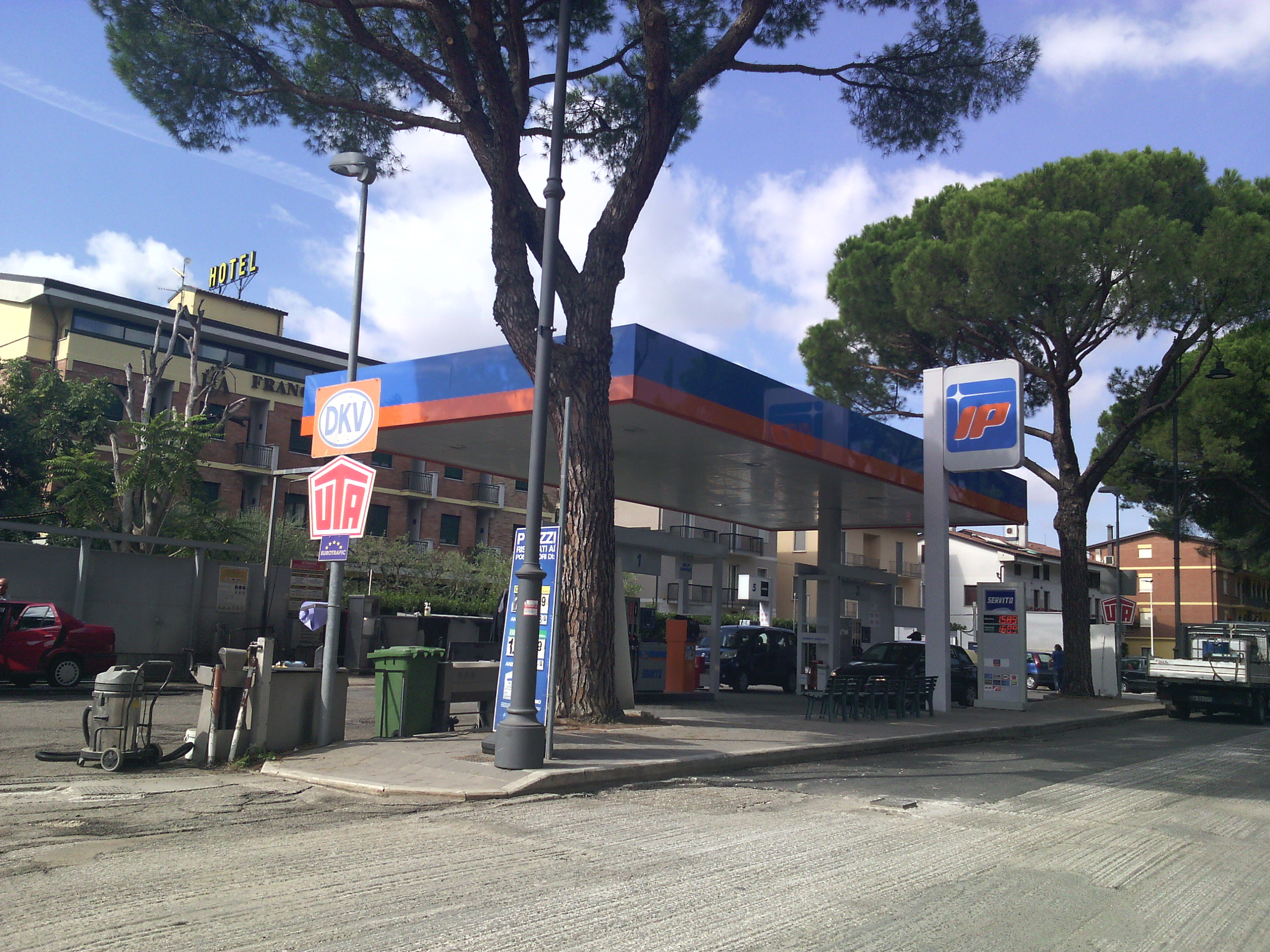 An IP (Italiana Petroli) service station in Santa Maria degli Angeli, a "frazione" of Assisi (Umbria, Italy), September 30, 2019.